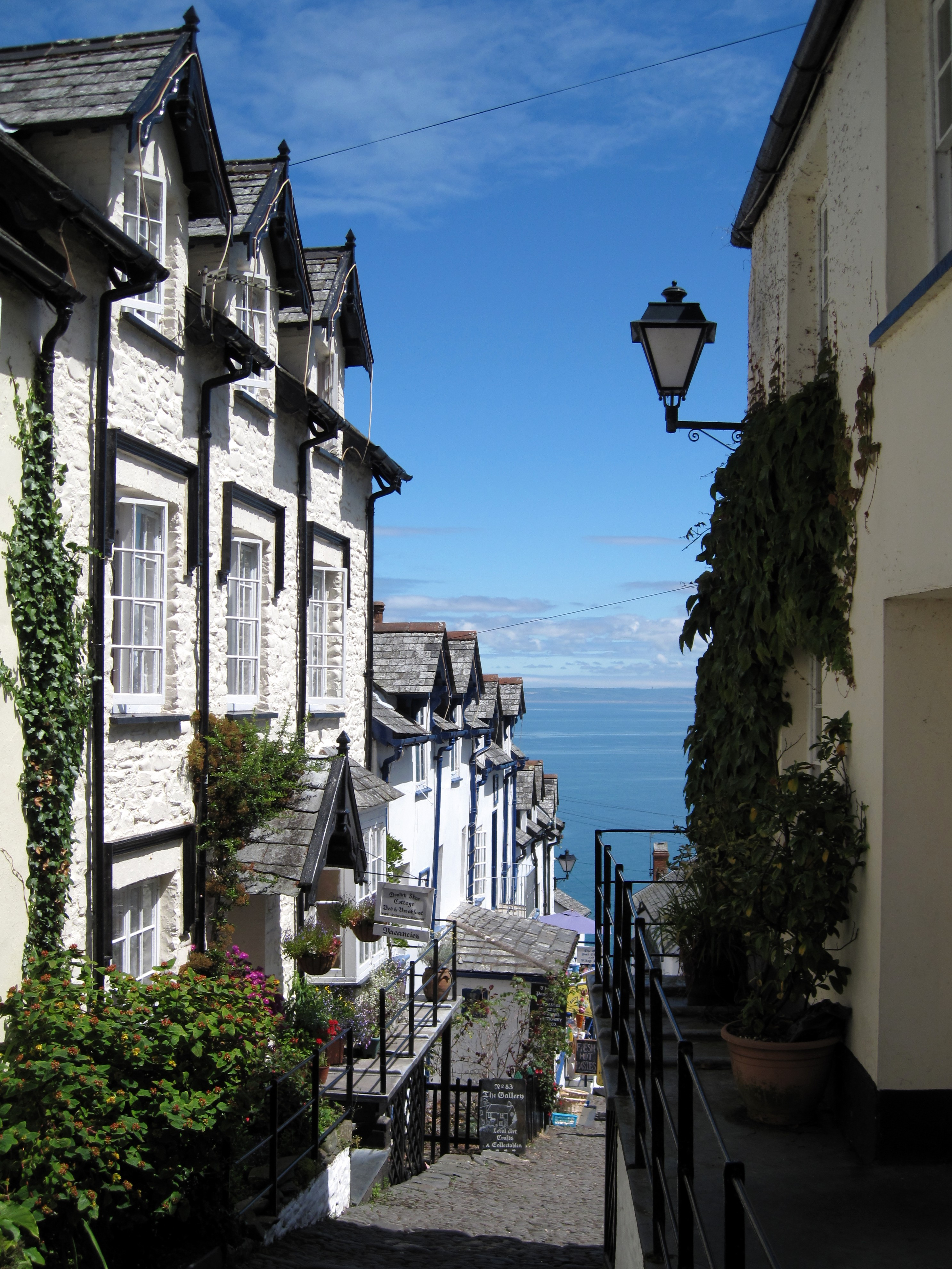 Clovelly, Devon, Großbritannien